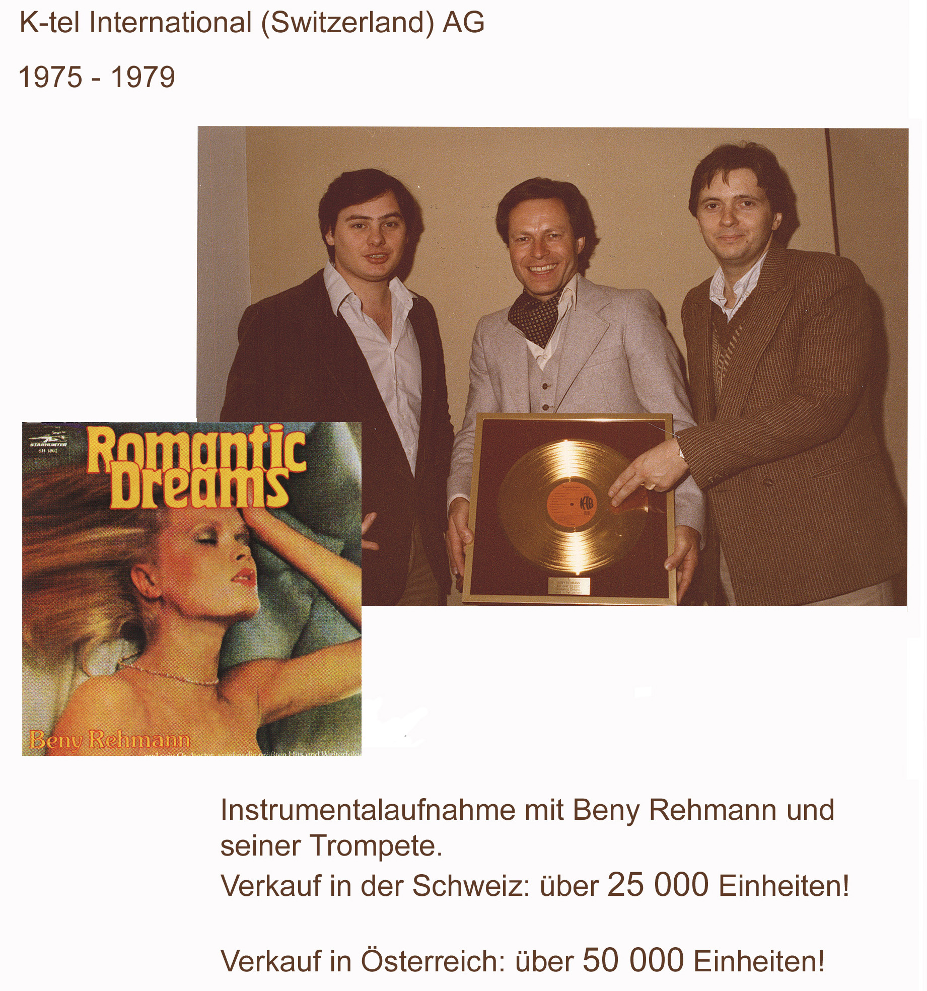 Übergabe der Goldenen LP für über 75'000 mit TV-Werbung in der Schweiz und Österreich verkaufter Tonträger von Romantic Dreams